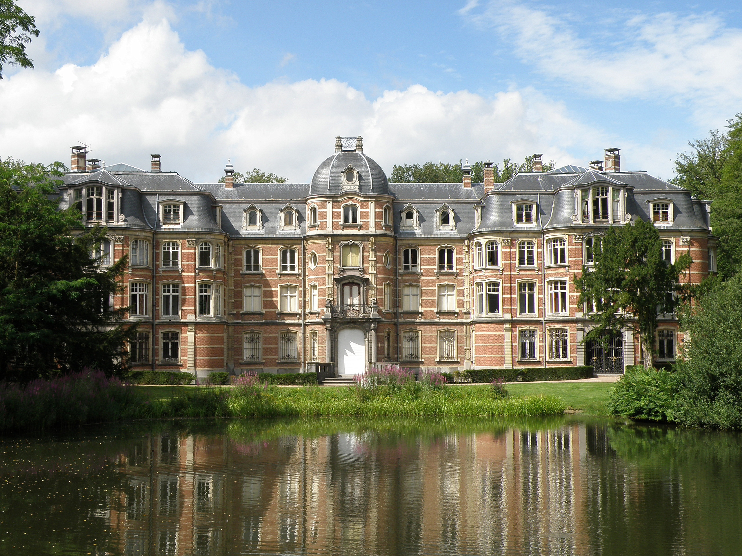 Stabroek, comm. dans la prov. d'Anvers (Belgique), à la frontière hollandaise. Château Ravenhof, de style néo-rococo, édifié pour partie début XIXe, pour partie début XXe. Arch. Fr. Stuyck. Parc s'étendant de part et d'autre de la frontière. Gloriette en territoire hollandais. Sur la photo : façade sud (arrière, côté jardin).